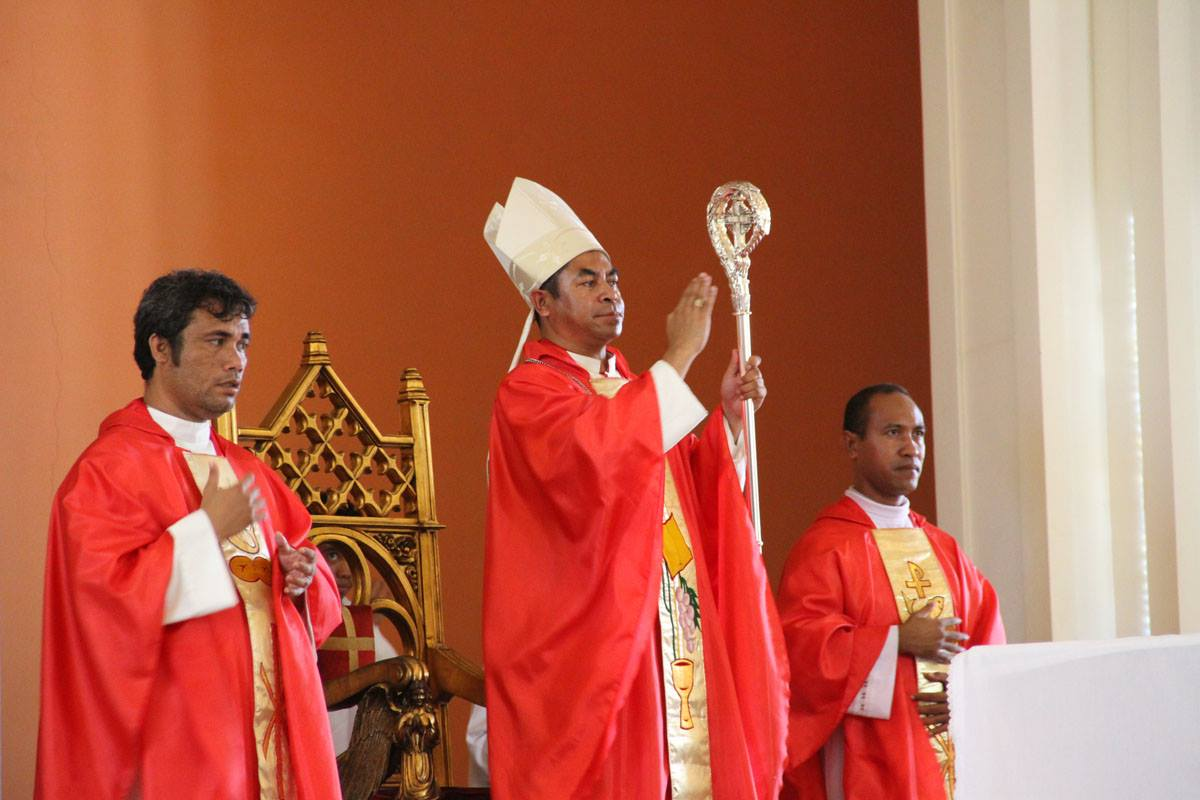 Tetun: Virgílio do Carmo da Silva